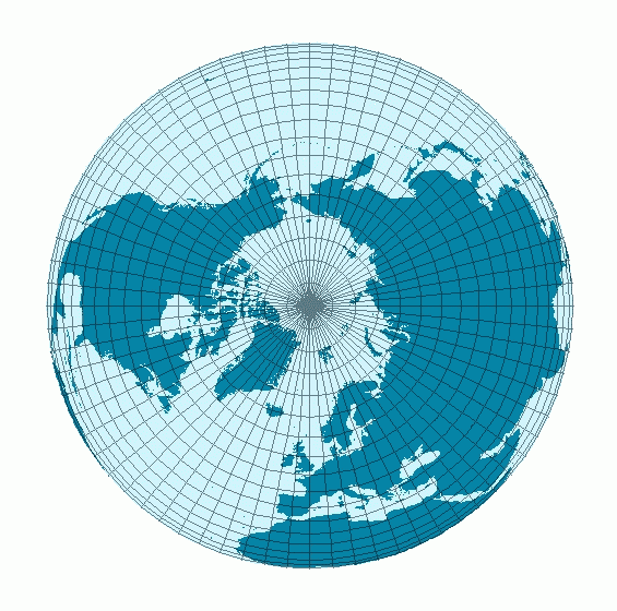 Nordhalbkugel groß selbstgezeichnet GNU-FDL